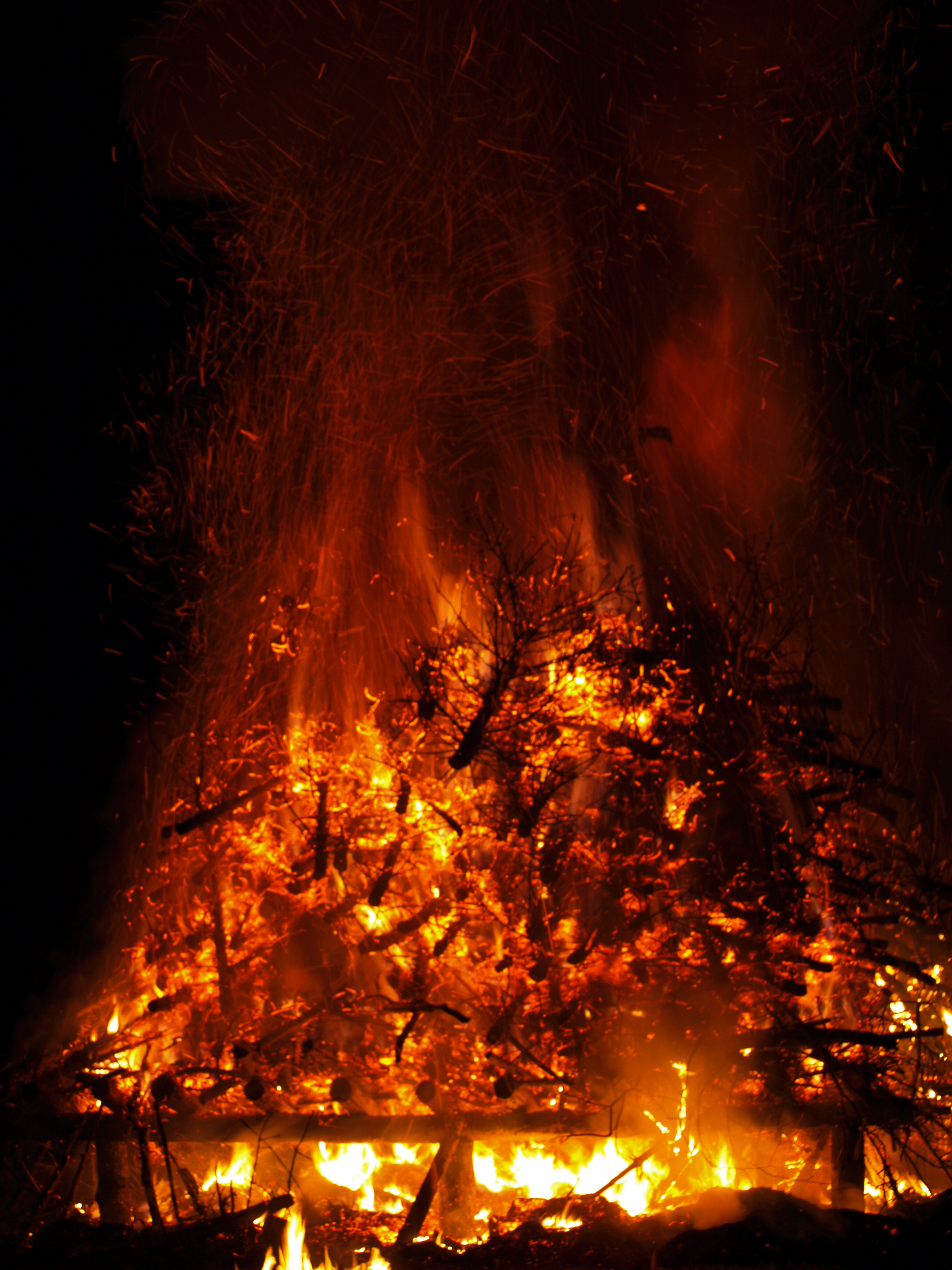 Hutzelfeuer in Silges im Jahr 2008